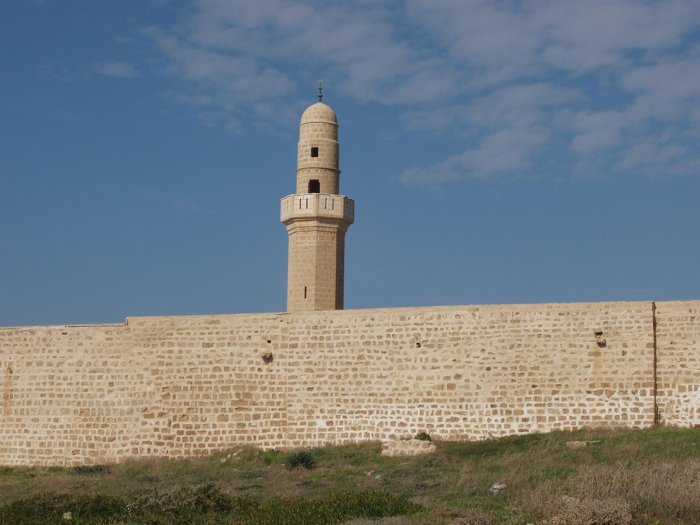 מסגד סידנא עלי, מבט מדרום. צילם דוד שי.